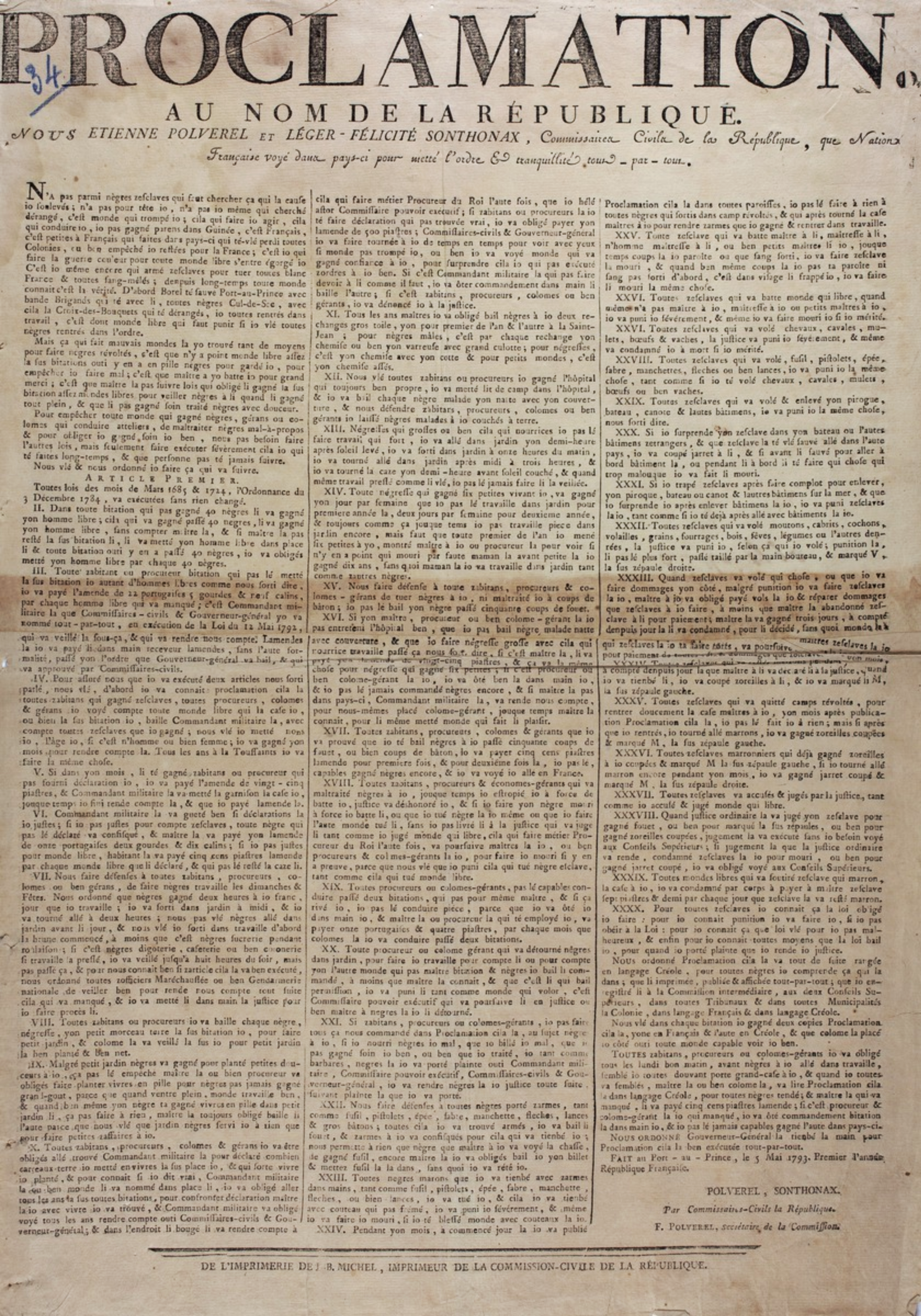 Étienne Polverel (1738-1795), Léger-Félicité Sonthonax (1763-1813), Archives nationales d’Haïti.- Proclamation. Au nom de la République. Nous Etienne Polverel et Léger-Félicité Sonthonax, Commissaires civils de la République, que Nacion Française voyé dans pays-ci pour metté l’ordre & tranquillité tout-par-tout (Titre dans la langue d'origine), Imprimerie J-B. Michel, Port-au-Prince, 5 mai 1793, Proclamation. Au nom de la République. Nous, Étienne Polverel et Léger-Félicité Sonthonax, commissaires civils de la République, Internet Archive.